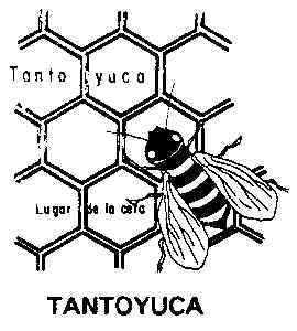 Escudo del municipio de Tantoyuca